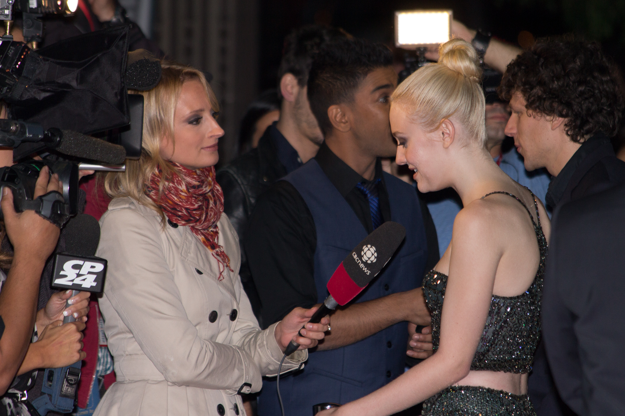 Natalie Kalata interviews Dakota Fanning at TIFF 2013.